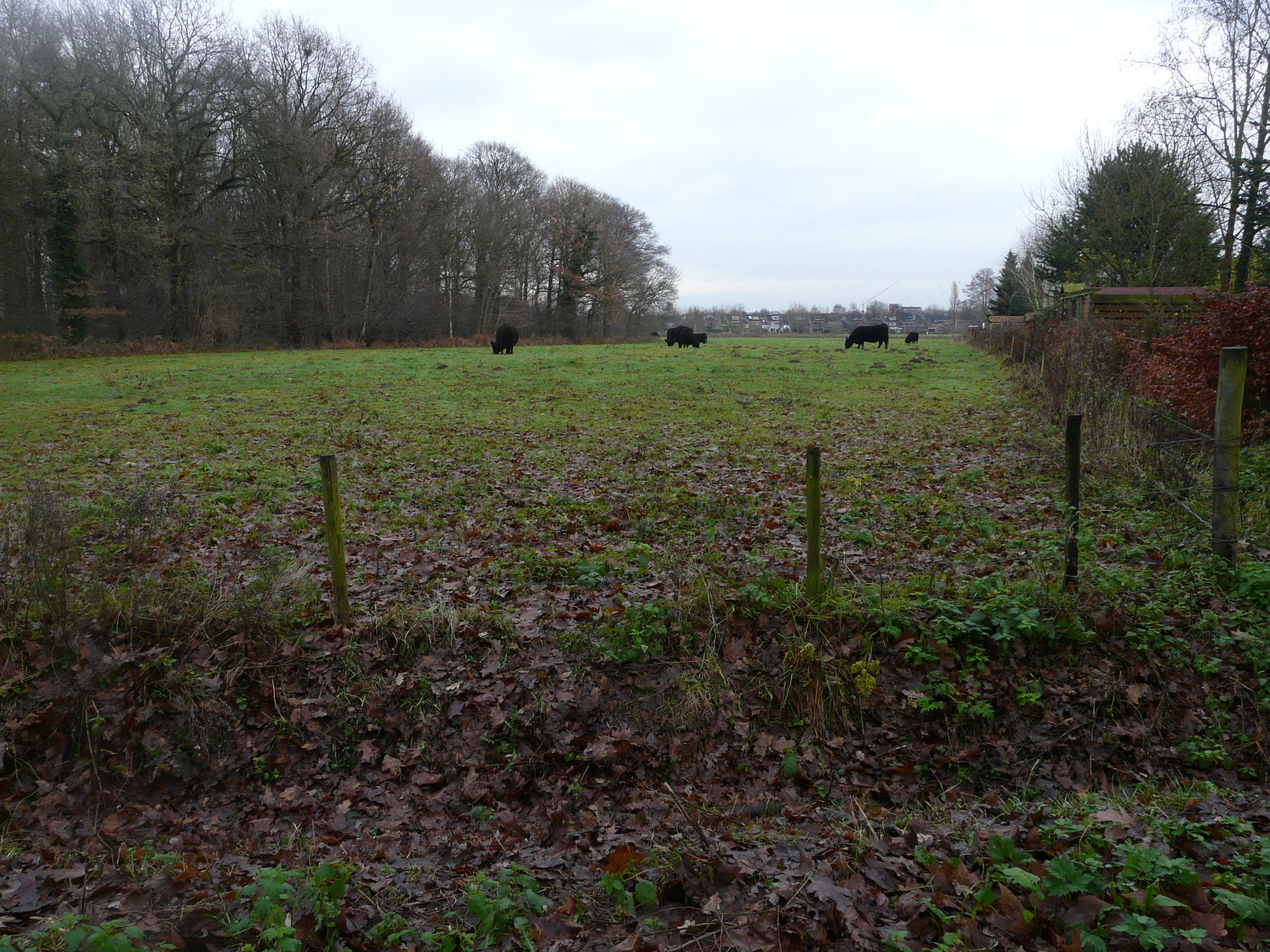 Landgoed Burgst in de Haagse Beemden in Breda